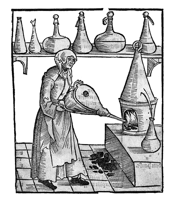 Titelblatt